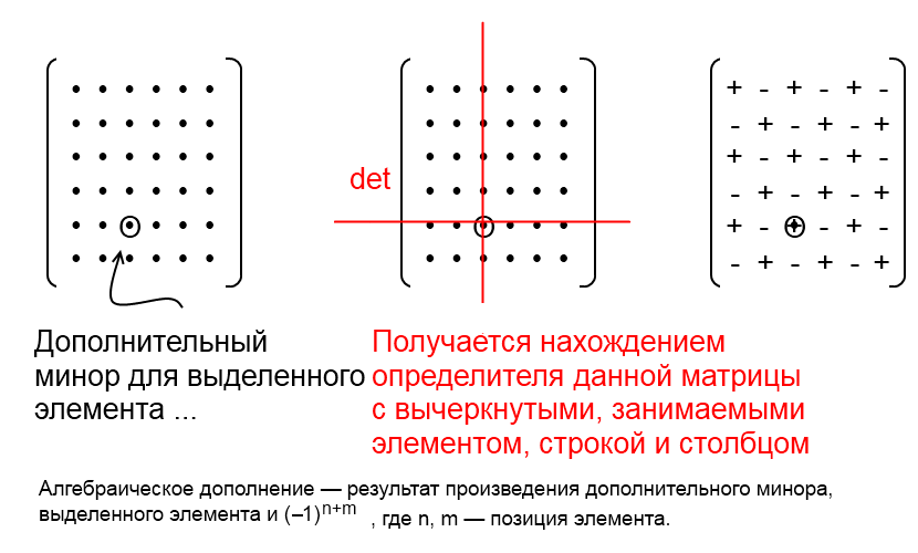 Алгебраическое дополнение